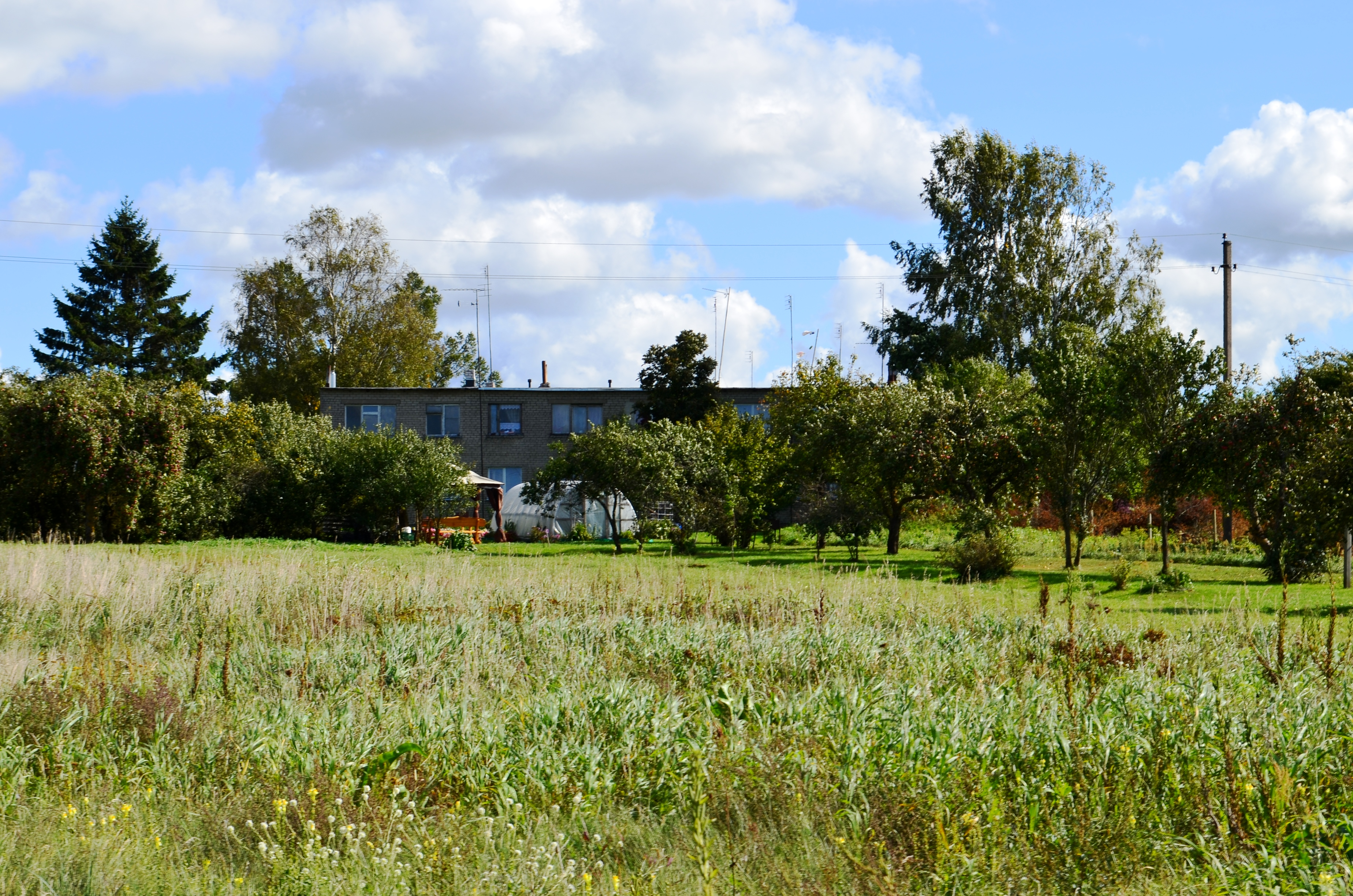 Žemaitėška: Ožlėiknē, Šėlotės rajuons